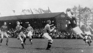 Ove Nilsson Halmstads BK ingriper i en allsvensk match mot Hälsingborgs IF på Örjans vall i Halmstad. HBK-seger, 2-1.